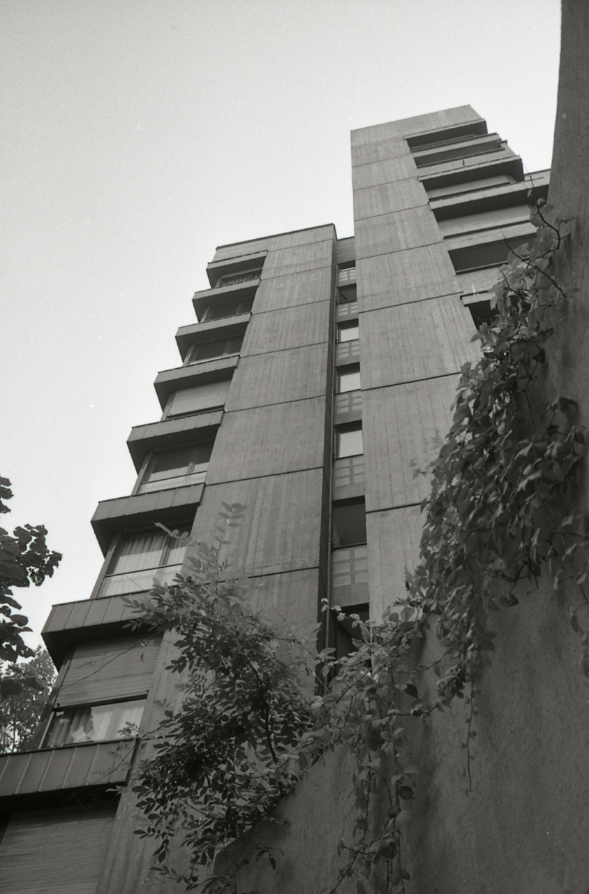 Milano, complesso residenziale in piazzale Aquileia 8 (angolo via Lipari), costruito nel 1965 su progetto di Vico Magistretti. Fonte: Maurizio Boriani, Corinna Morandi, Augusto Rossari, Milano contemporanea. Itinerari di architettura e di urbanistica, Maggioli Editore, 2007, p. 255. ISBN 978-88387-4147-6 Invalid ISBN. Servizio fotografico : Milano, 1965 / Paolo Monti. - Strisce: 6, Fotogrammi complessivi: 35 : Negativo b/n, gelatina bromuro d'argento/ pellicola ; 35 mm. - ((I fotogrammi hanno una doppia numerazione. - Sul portanegativi: Leica IF 35 mm. - Occasione: Pubblicazione